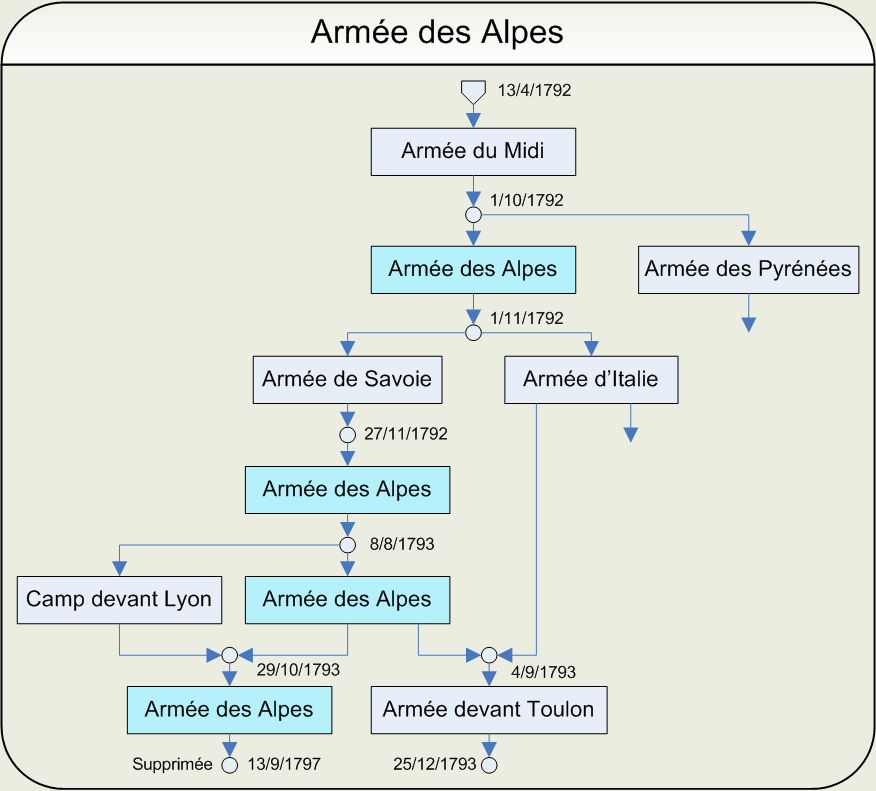 Ordinogramme de l'armée des Alpes Dessin réalisé par Papier K